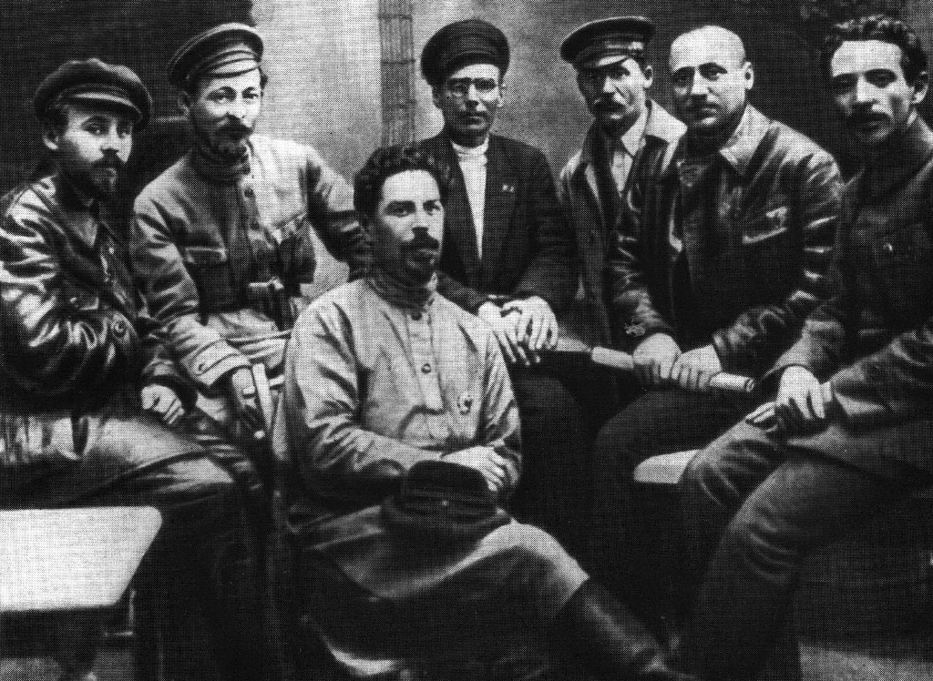 Григорий Семенович Мороз (1893-1937) - крайний справа. Чекисты (1919) - С. Г. Уралов, Ф. Е. Дзержинский, К. М. Волобуев, М. И. Васильев-Южин, В. И. Савинов, И. К. Ксенофонтов, Г. С. Мороз